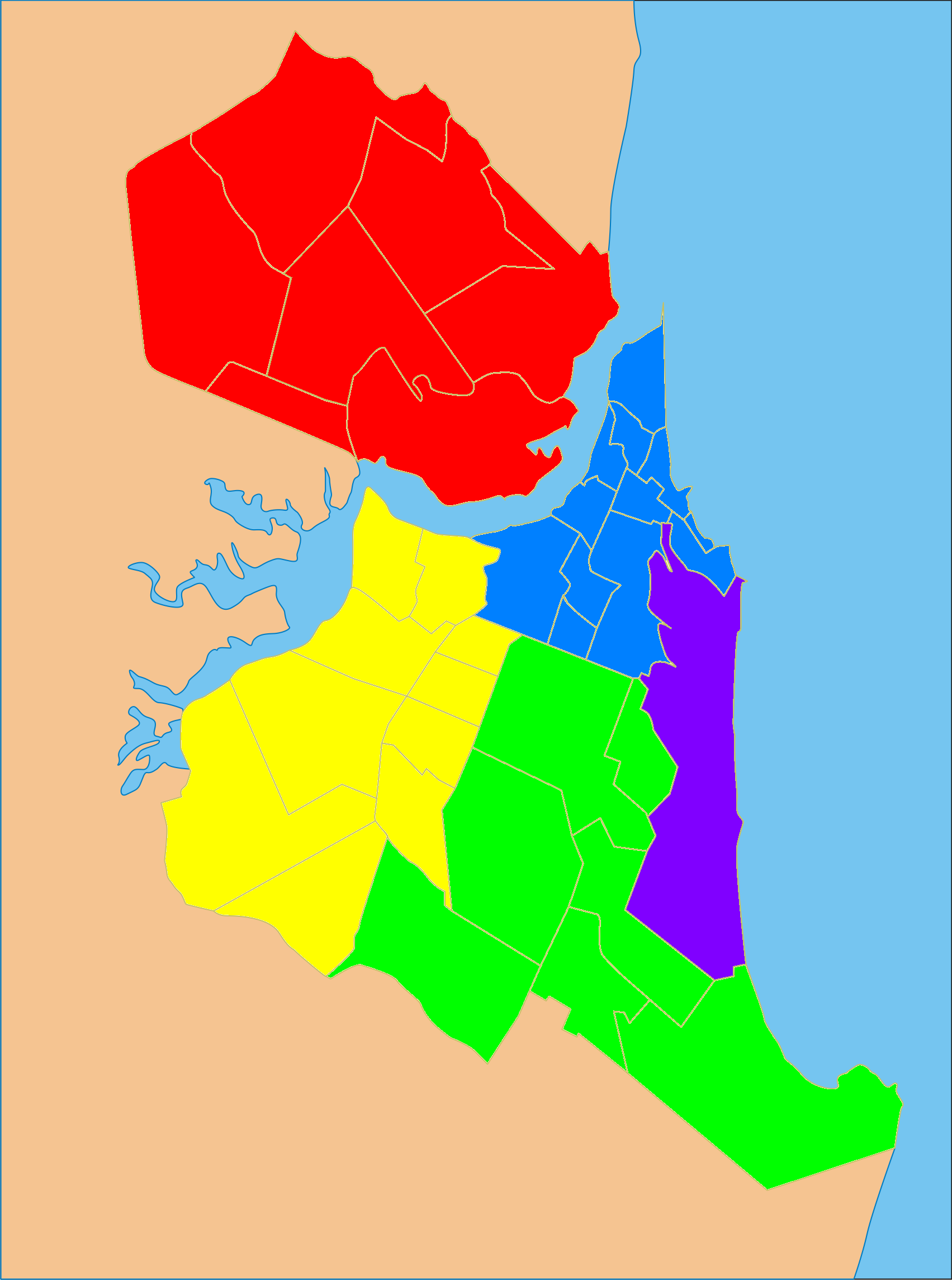 Mapa das zonas de Natal (RN): em vermelho, a zona norte; em verde, a zona sul; em azul, a zona leste e, em amarelo, a zona oeste. Em roxo a área do Parque das Dunas.